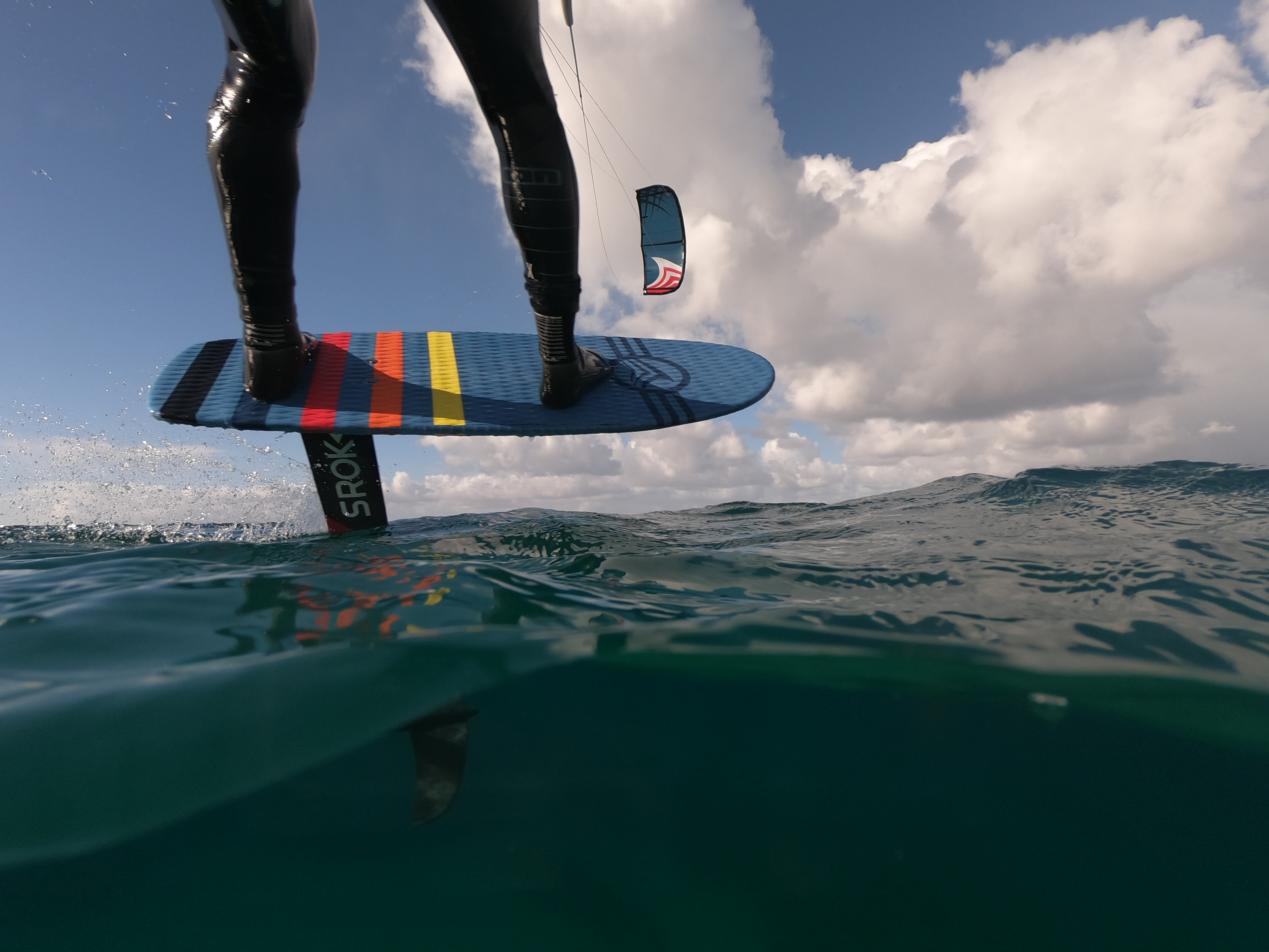 Bruno Sroka sur un kitefoil. UN kitefoil Sroka, une pocket board et une aile Ouesk.